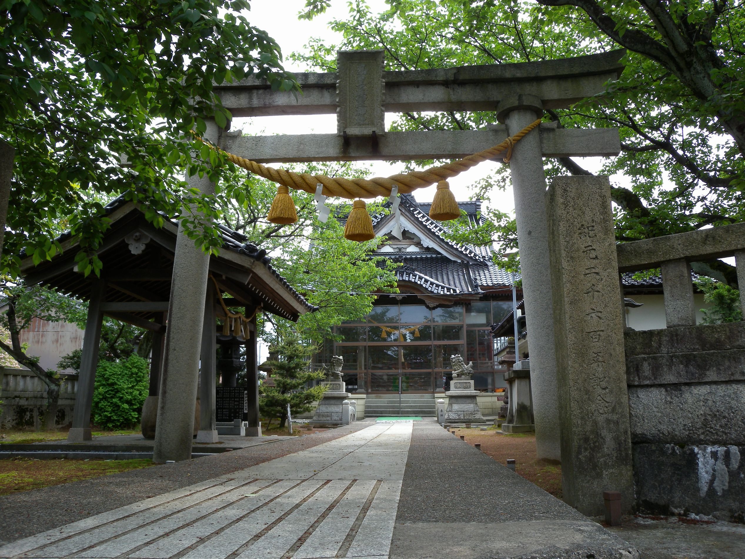 高皇産霊神社の前景